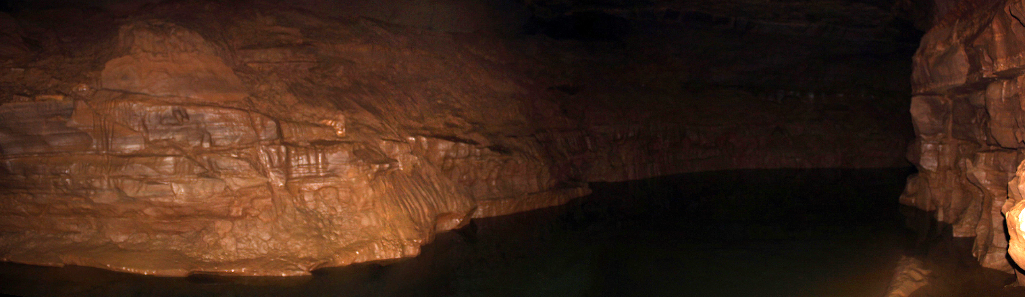 River Styx, Mammoth Cave National Park